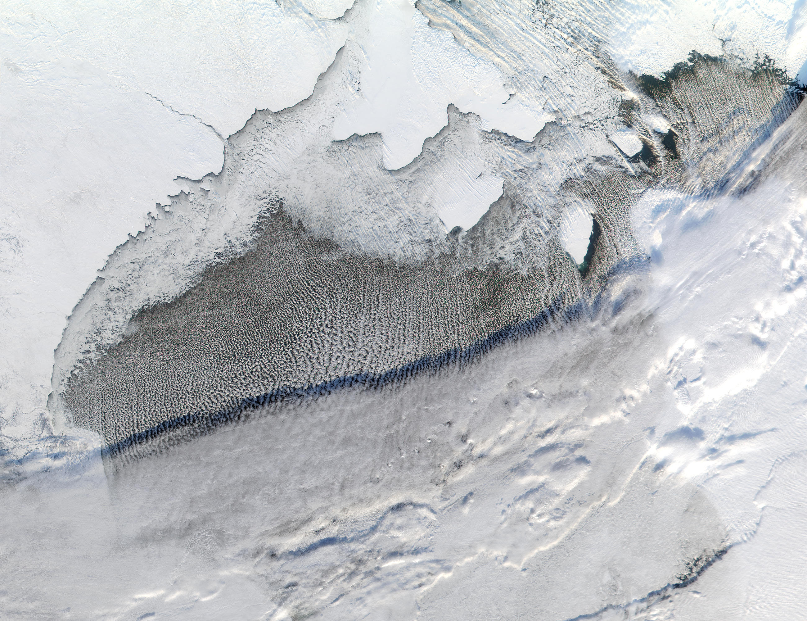 Hudson Baai, van MODIS.